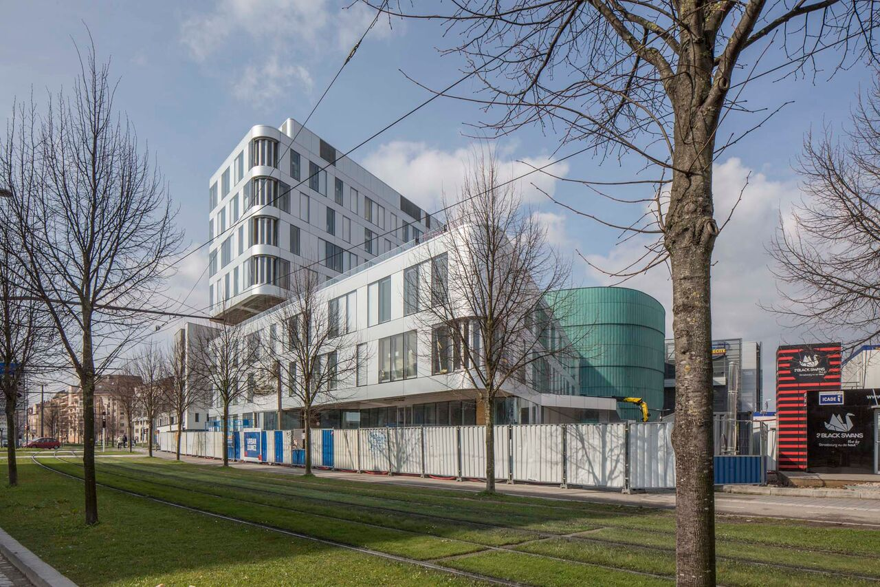 Façade avant des locaux de l'INET, la grande école du service public local